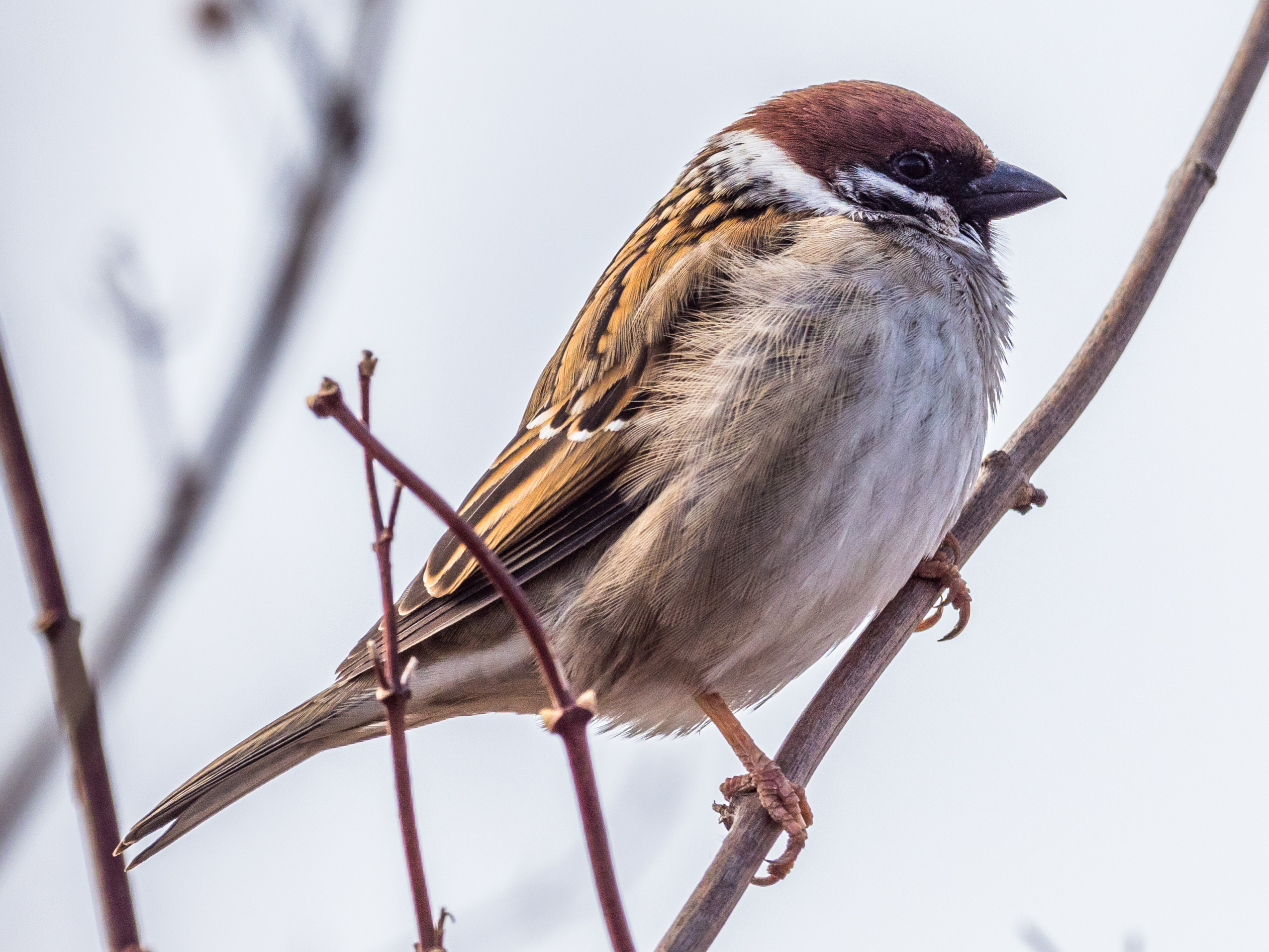 Vaxholm, Stockholm, Sweden, April 2018